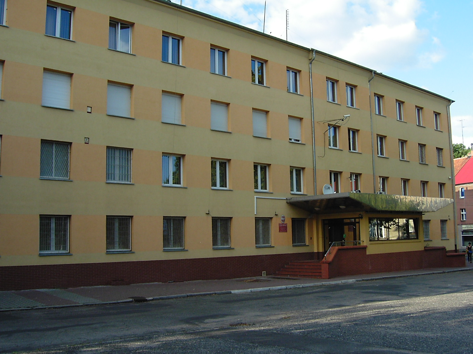 Koszary w Żaganiu